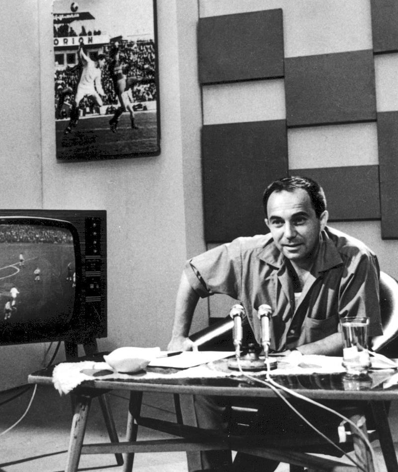 MTV stúdió, Vitray Tamás műsorvezető.